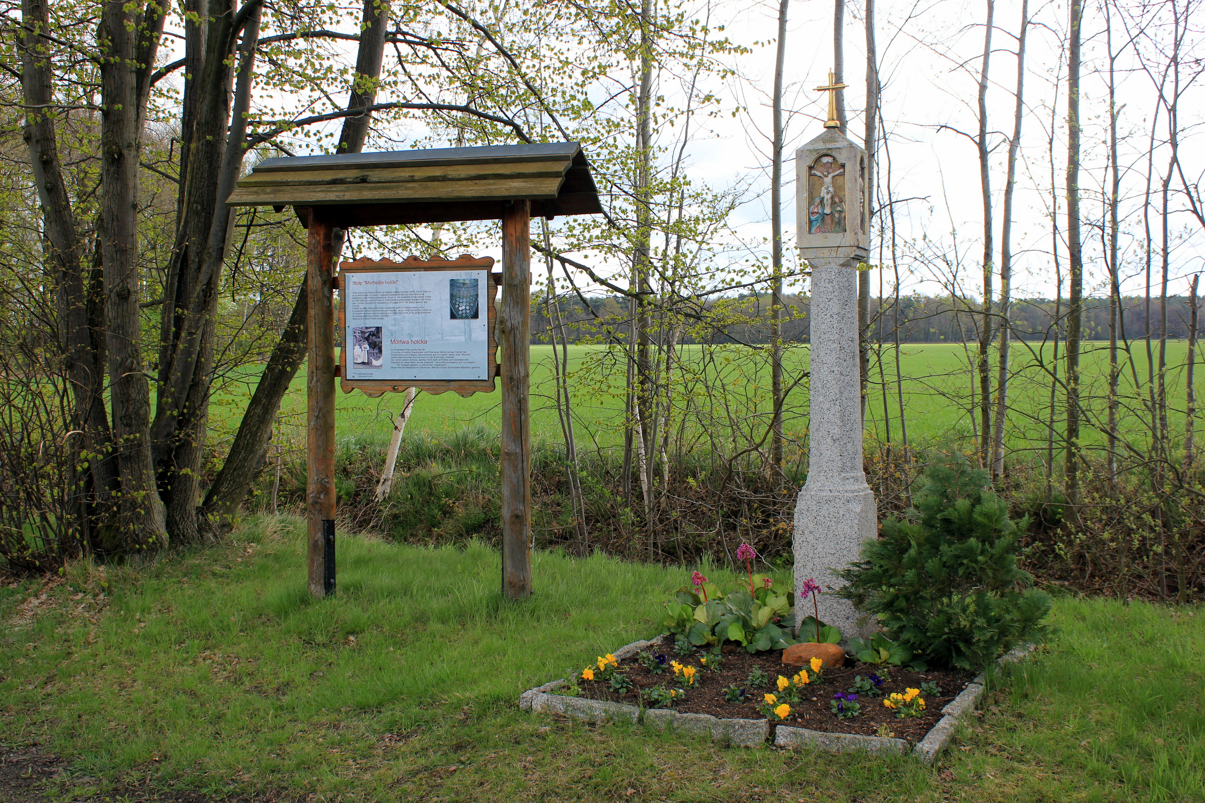 Hornjoserbsce: Wopomnjenski stołp "Mortwa holčka" mjez Konjecami a Koćinu.